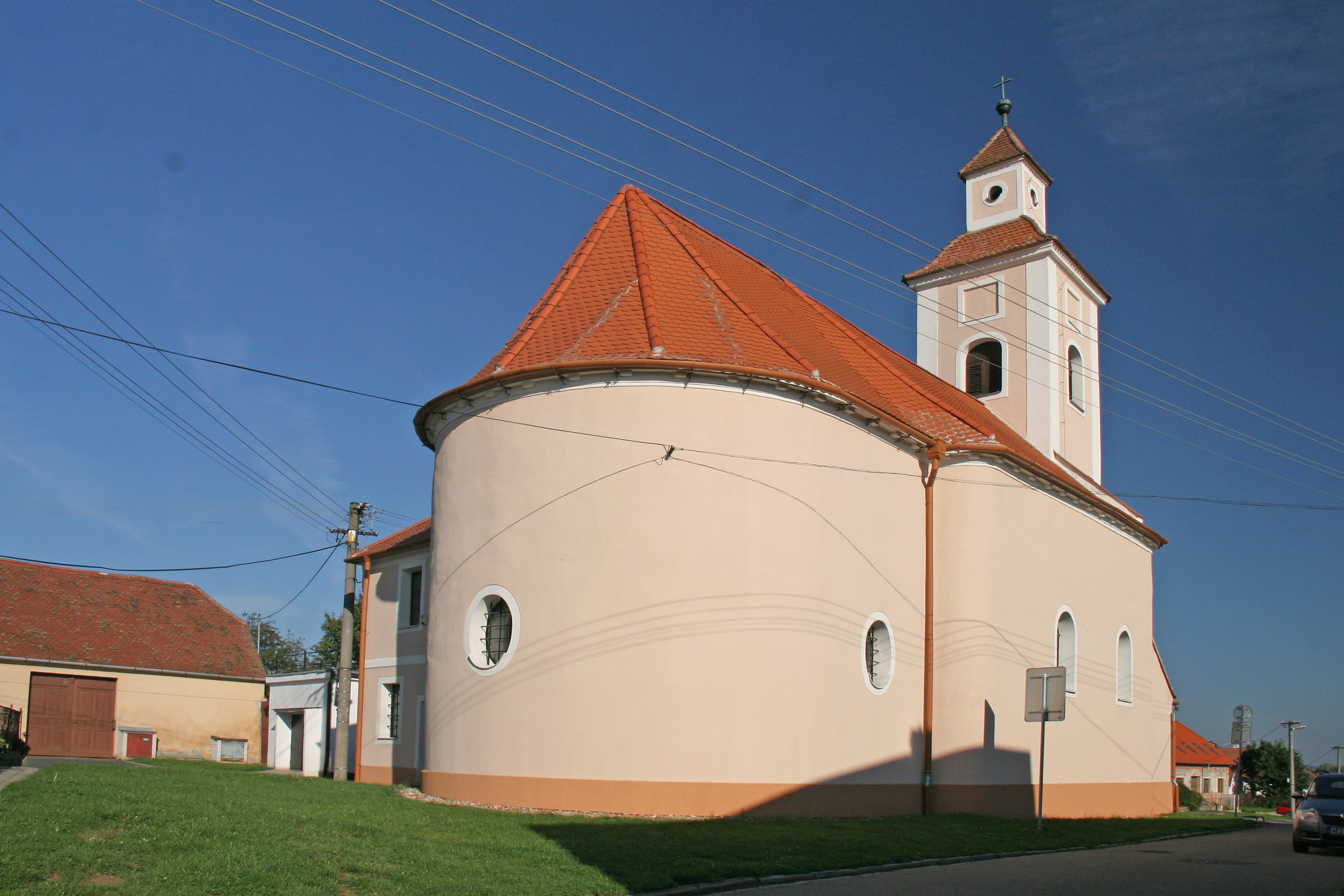 Kostel svatých Jana a Pavla, náves, Citonice.